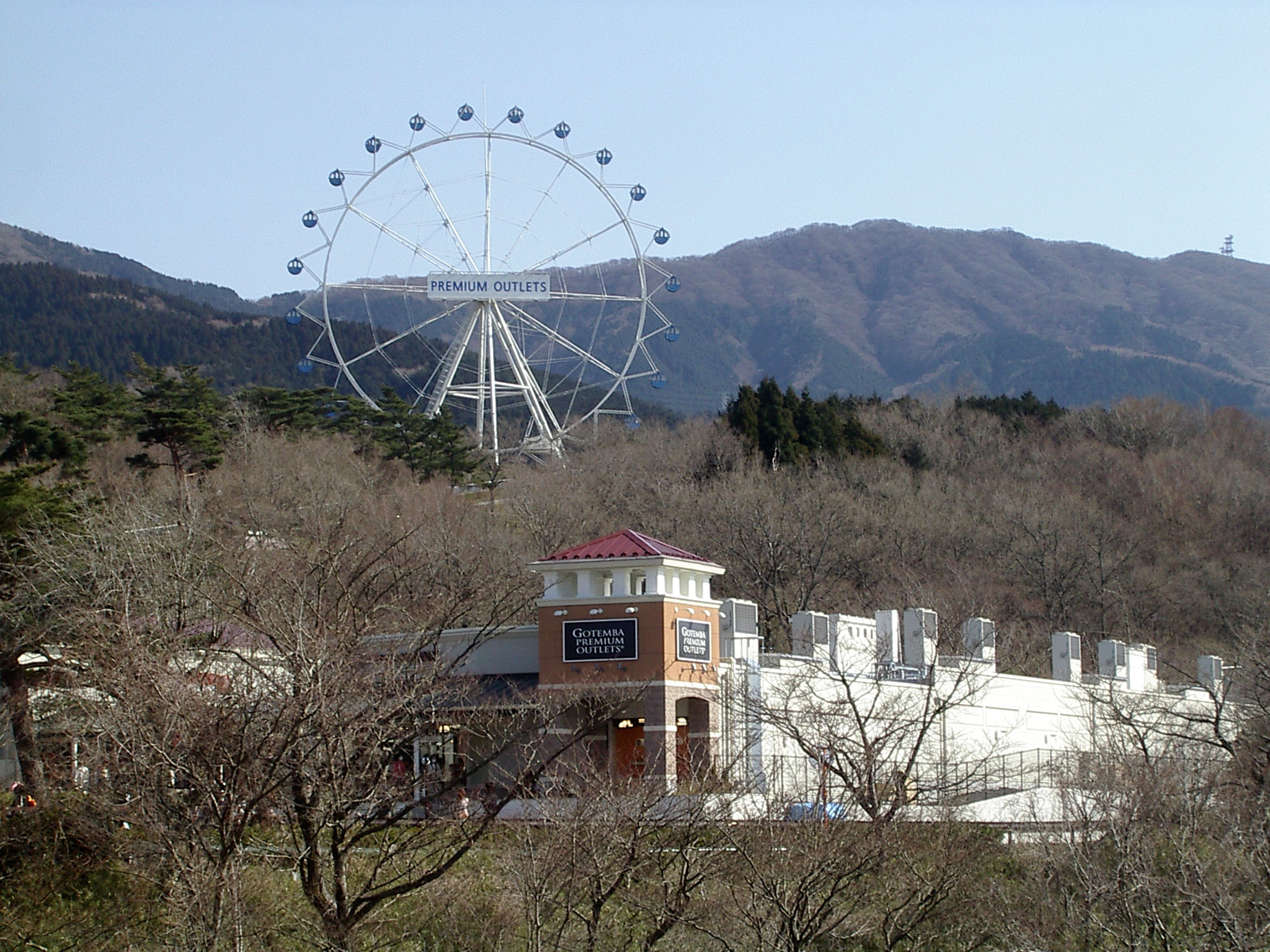 静岡県御殿場市の御殿場プレミアムアウトレット Gotemba Premium Outlets in Gotemba, Shizuoka, Japan